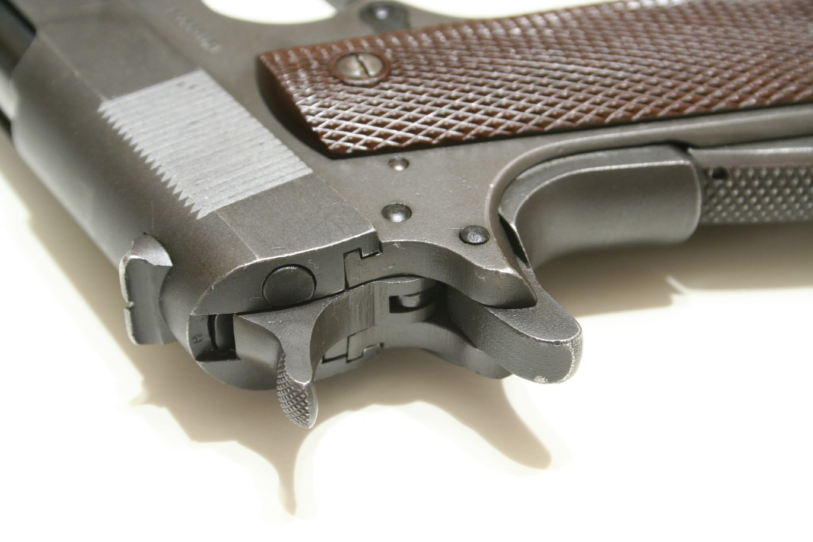 1911 Mfg. in 1917